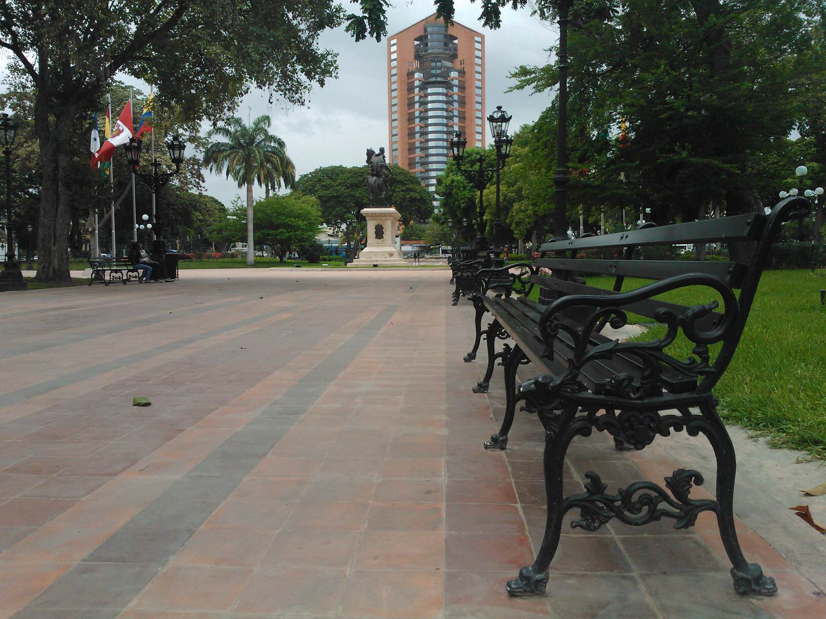 Puede notarse la continuidad arquitectónica entre dos de los íconos de la ciudad construidos con muchos años de diferencia y con diferentes estilos arquitectonicos.